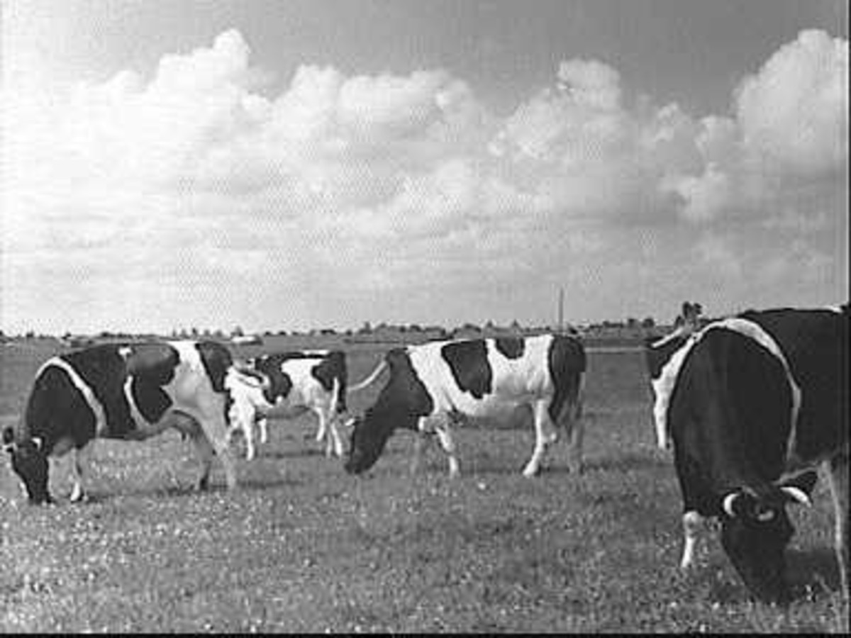 Rundvee: grazend vee nr. 53-158-5b (opmerking: Deze afbeelding hebben wij helaas alleen in deze lage resolutie.)